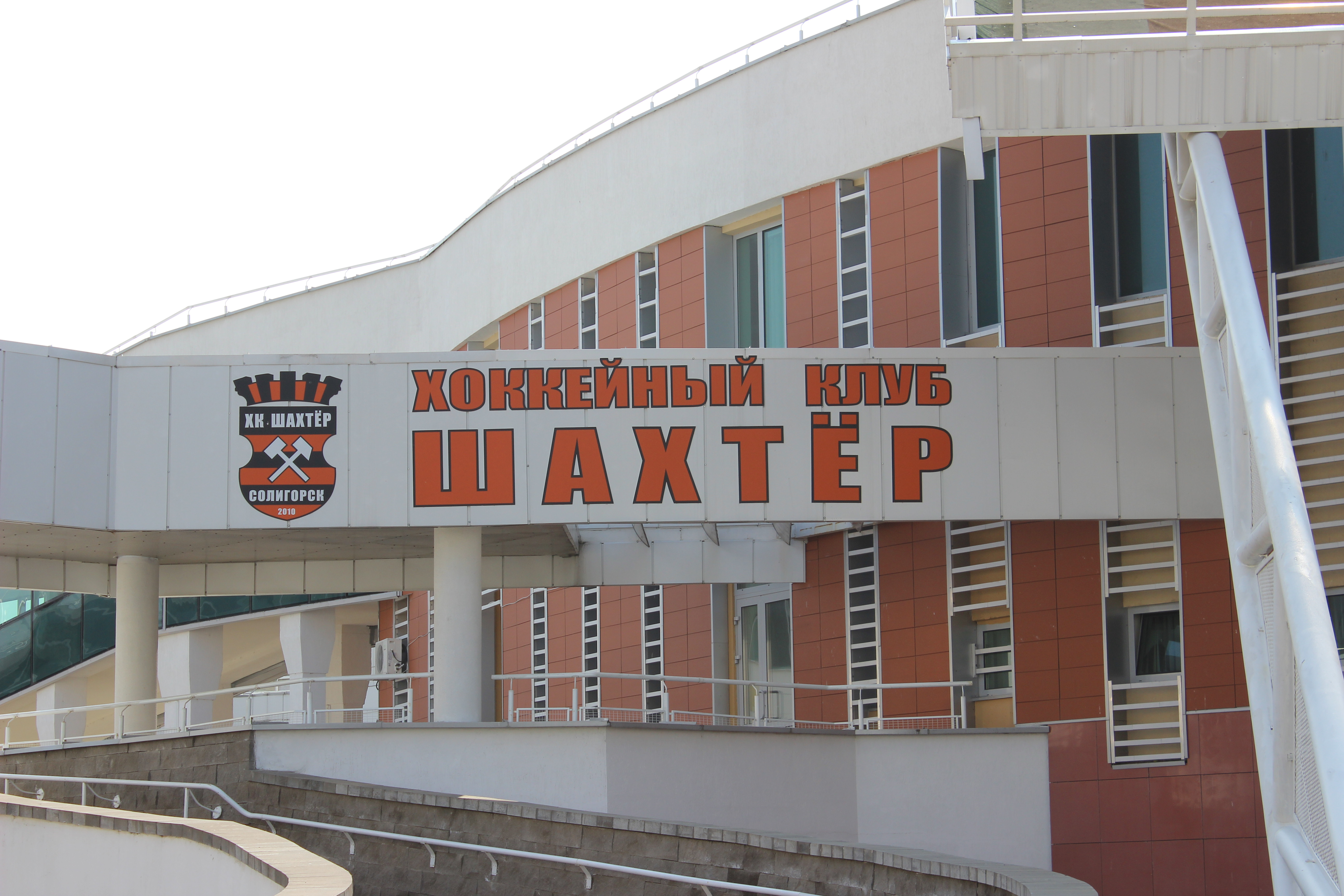 Хоккейный клуб "Шахтёр"